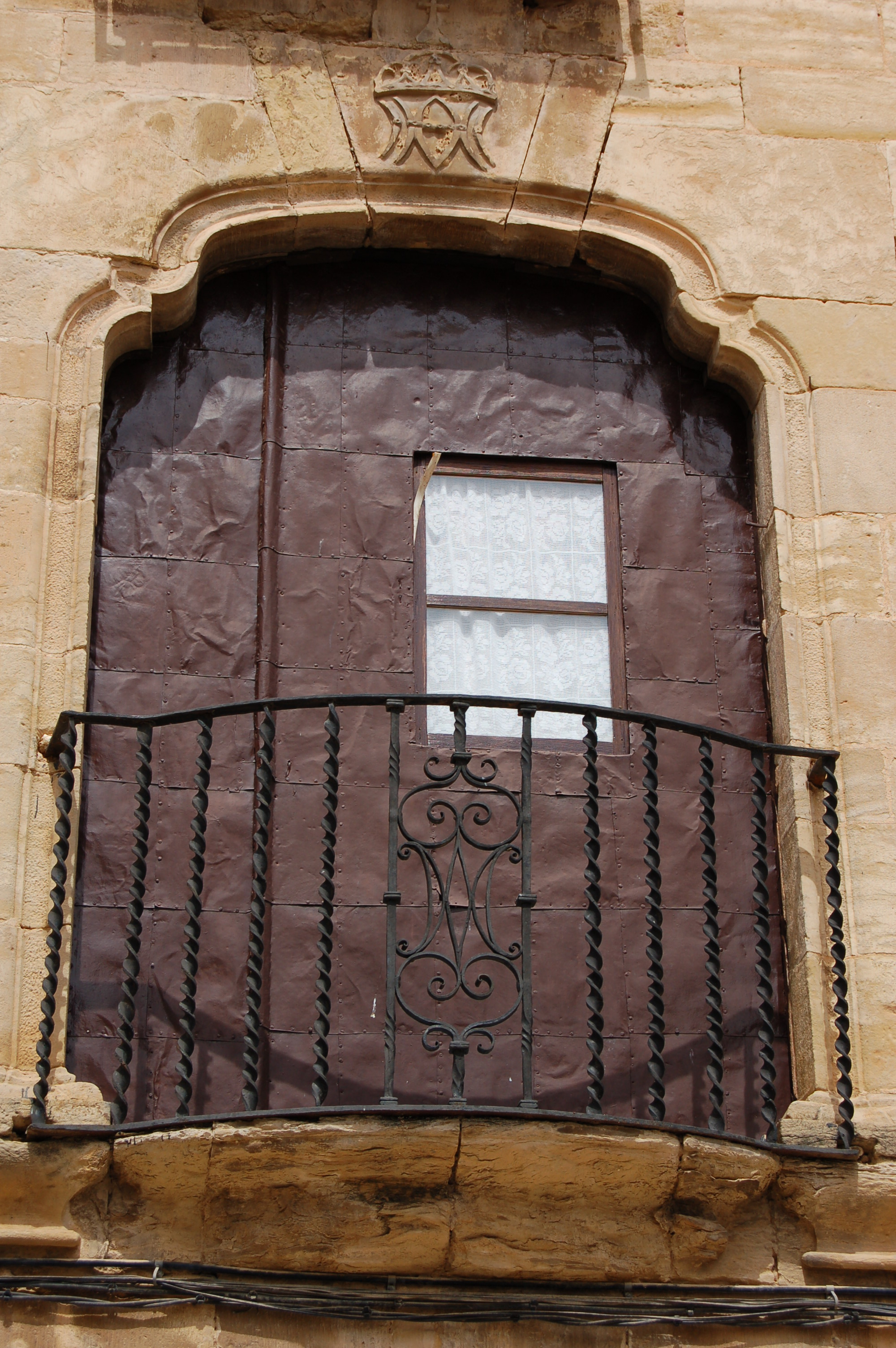 Detalle de la fachada de la casa del Solá